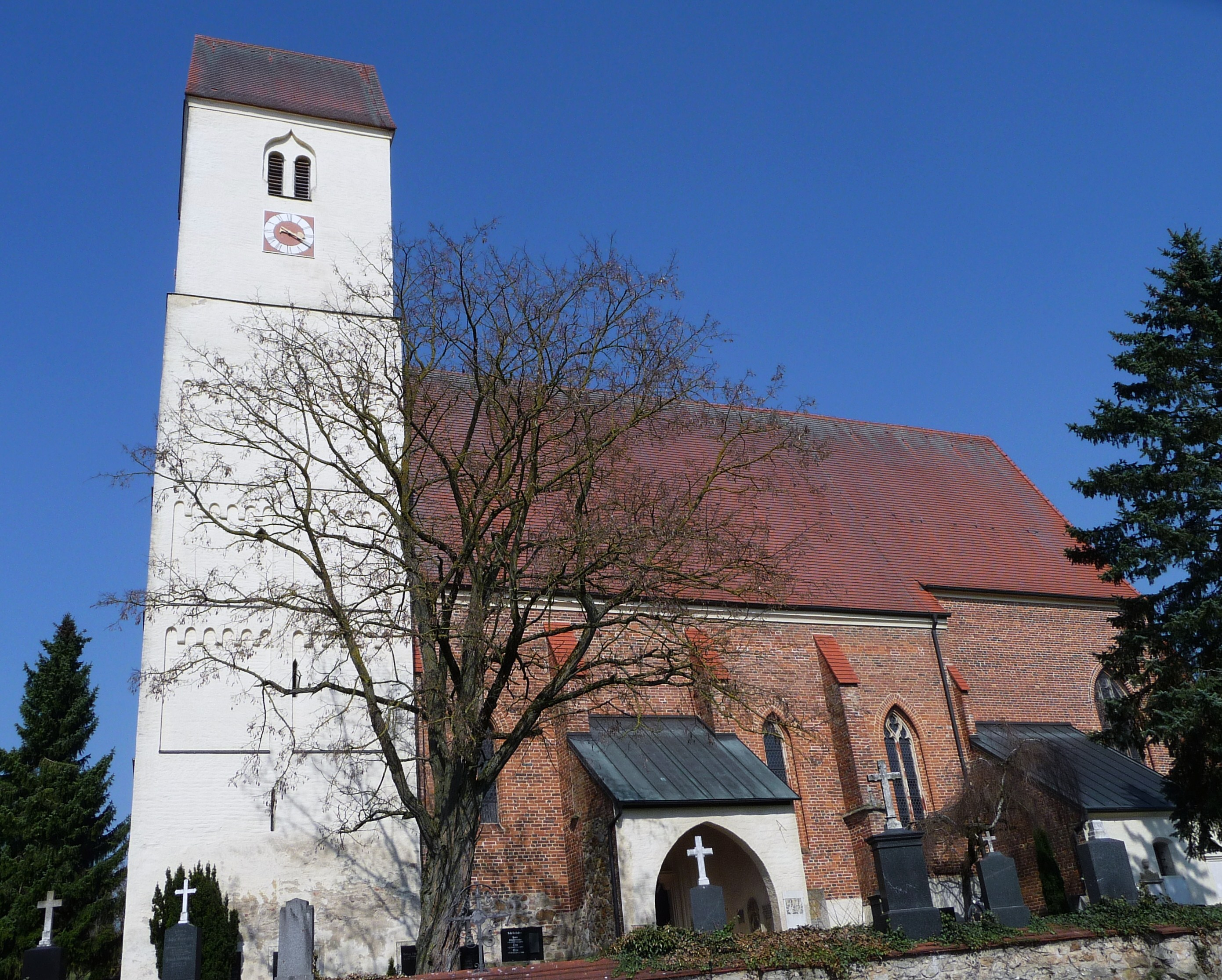 Die evangelische Laurentiuskirche in Steinkirchen, Gemeinde Ortenburg